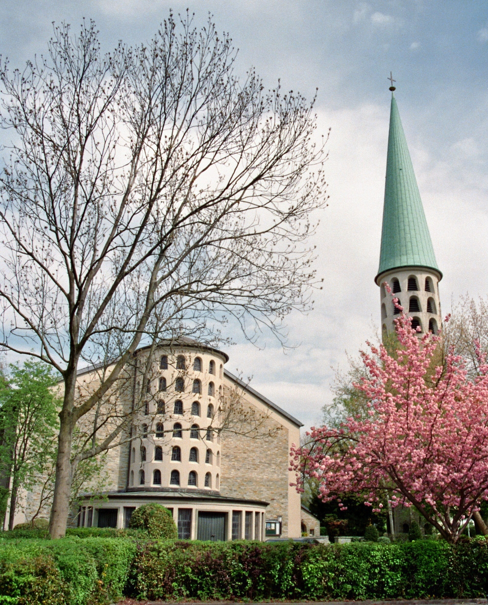 Pfarrkirche St. Norbert Werl, Nordrhein-Westfalen, Deutschland.